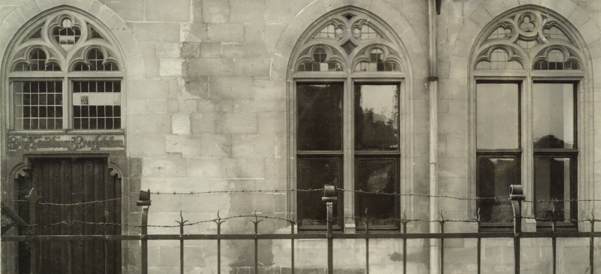 Kruisherenklooster: detail oostgevel (achter hek met puntdraad) ten tijde van "Rijks Landbouw Proefstation" (1897-1980).